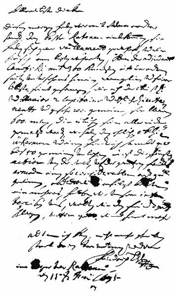 Brief des Landgrafen Friedrich von Hessen-Homburg vom 15.6.1675 an seine Gemahlin: "Allerlibste Dicke Diesen Morgen haben wir mit stürmender handt, den Basse Ratenau einbekommen, sie haben sich zwar vaillament gewehret, und wie sie sich am besten wehreten, kam der Adjudant Canolski mit 300 Knechten auff der seiten unversehens hinein, wangelin und seine libste seint gefangen, wie auch der Obristl. und Major, 2 Captaine und ettliche Lieutenents, und gefehr 100 gemeine, sie waren 600 mann, die übrichen sein alle nidergemacht worden, wir haben den ehrlichen obL. Ückermann und einen fendrich sambt 40 bis 50 gemeinen verlohren, es ist die schönste action von der welt, vor der gantzen feindtl. armada einen so considerablen ordt zu gewinnen, ob Gott will erfolgt balt ein meheres, hetten wir unsere infanterie bey uns, wollten wir den feindt gut schlagen, enfin Gott wirdt schont machen. Adieu ich kann nicht mehr schreiben sterb Dein trewer mann und Diener Friedrich L. z. Hessen“